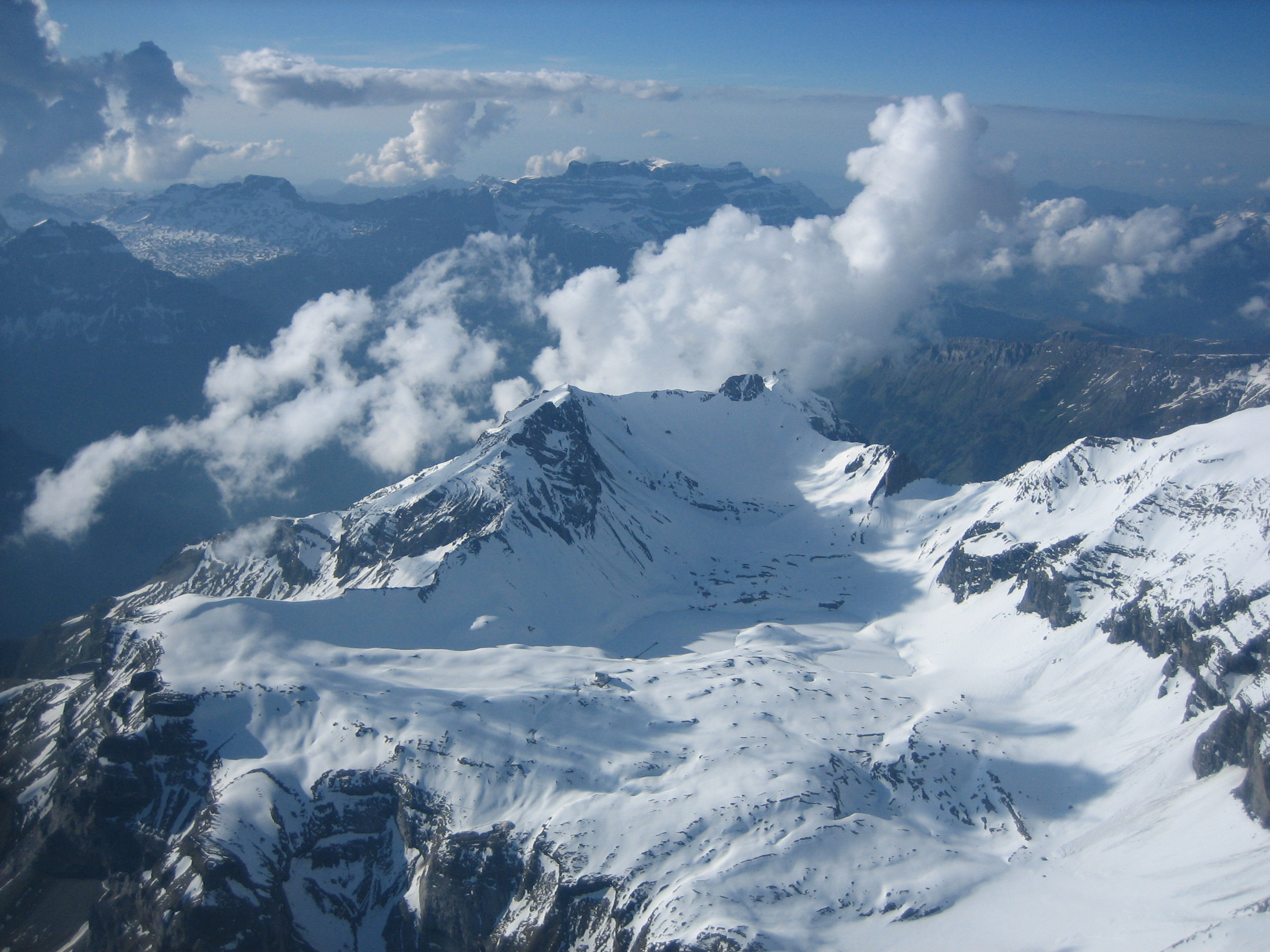 Muttsee aus dem Flugzeug